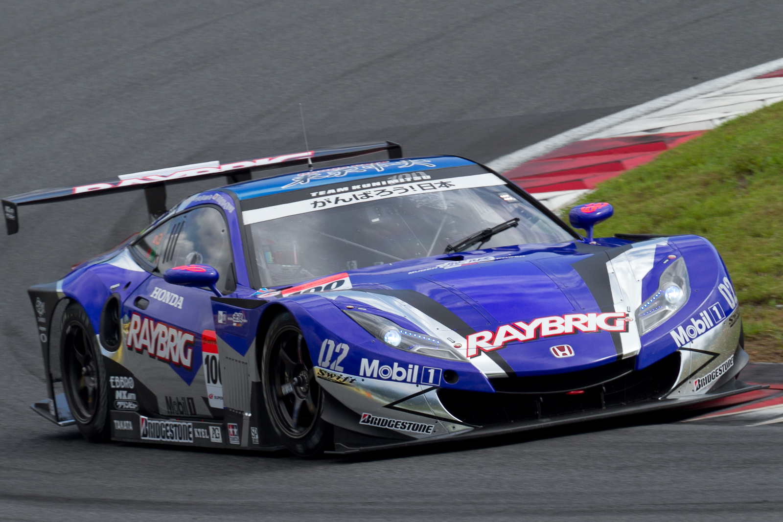 Super GT 2011 Rd.6 Fuji GT 250km: Takuya Izawa (Team Kunimitsu) driving the Honda HSV-010 GT.